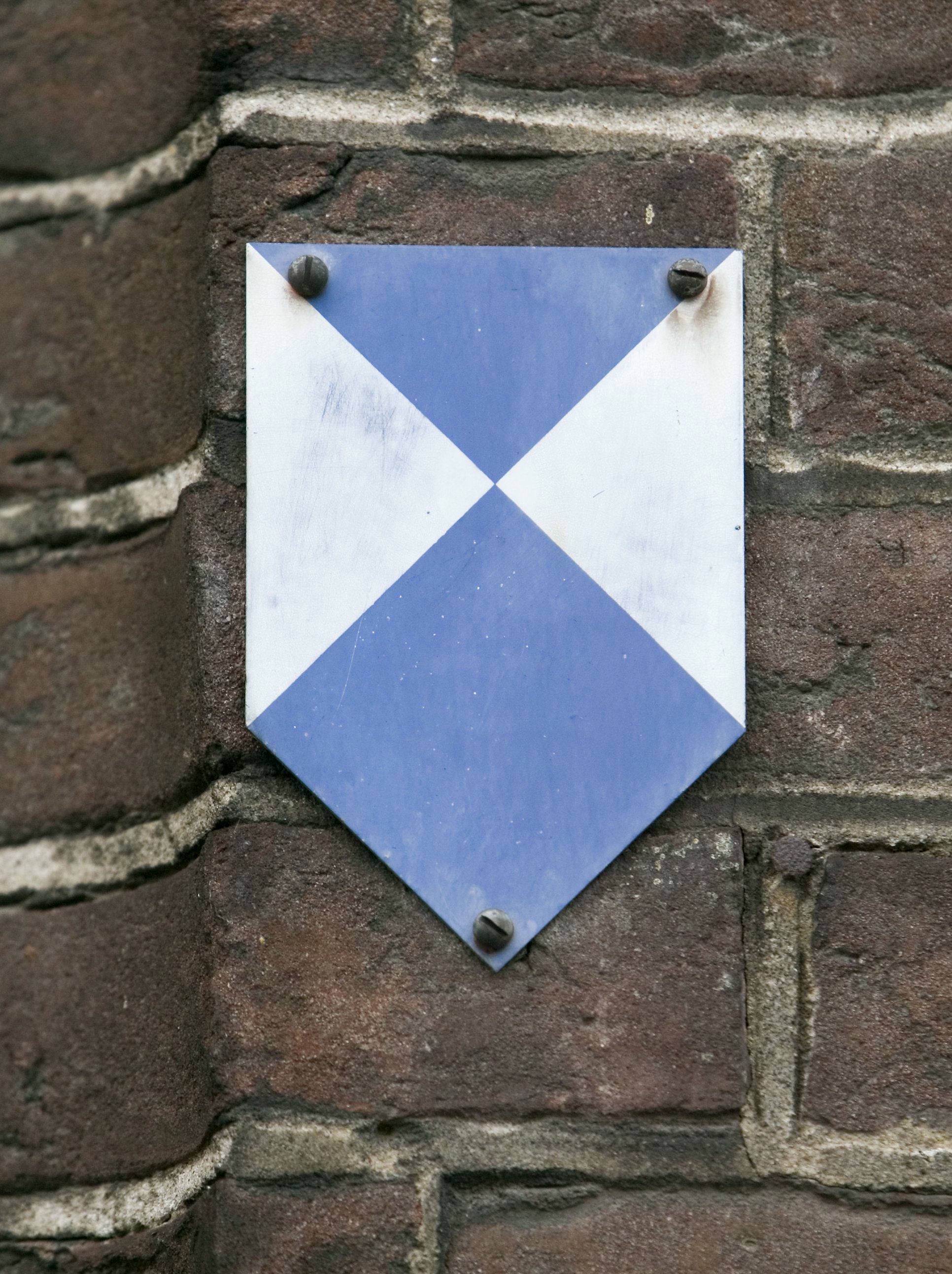 Monument/ Bord: Blauwschildje (opmerking: Gefotografeerd voor het Smallepad, uitgave van de RACM)